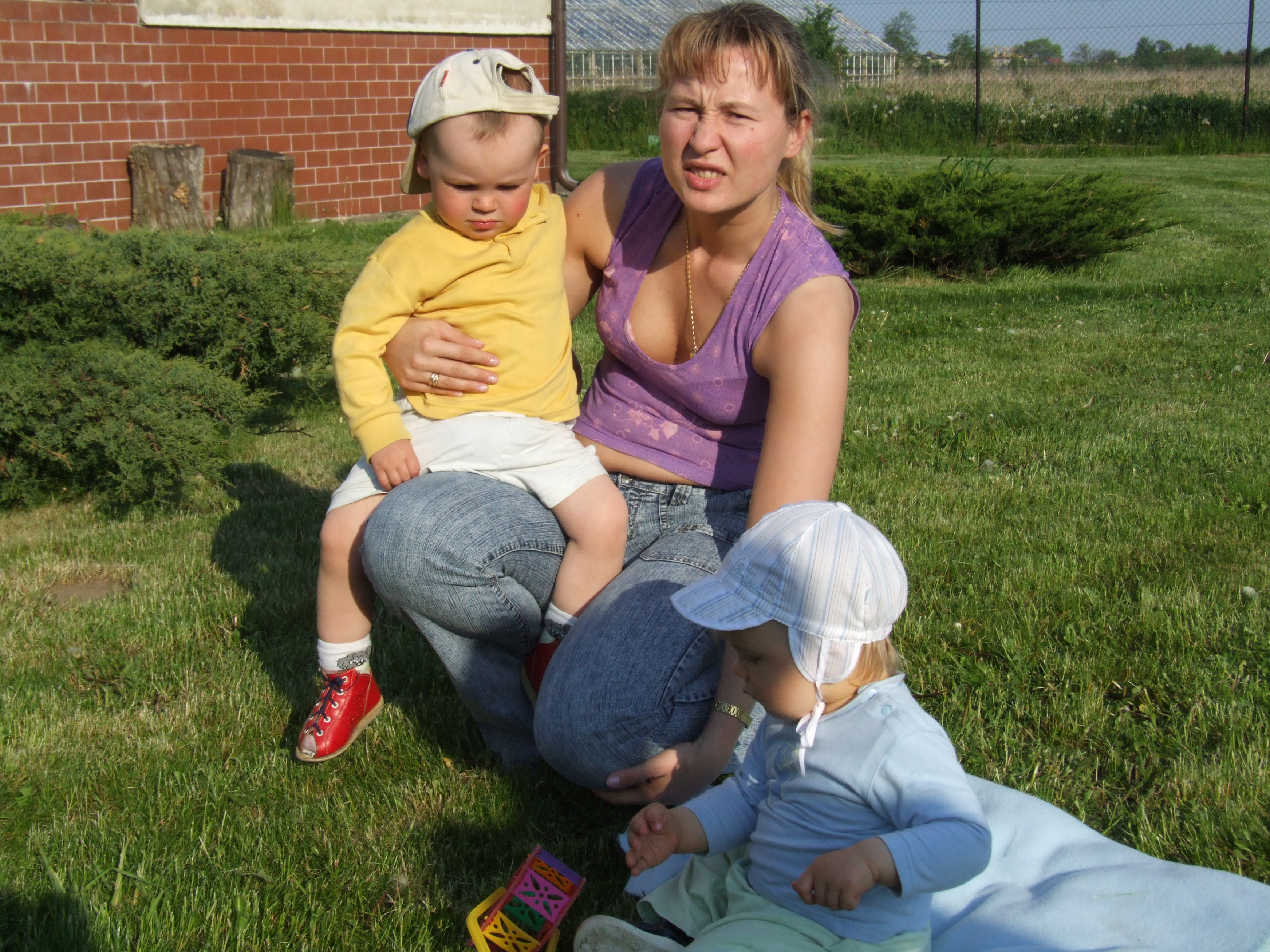 Aga z Szymonem i Krystianem